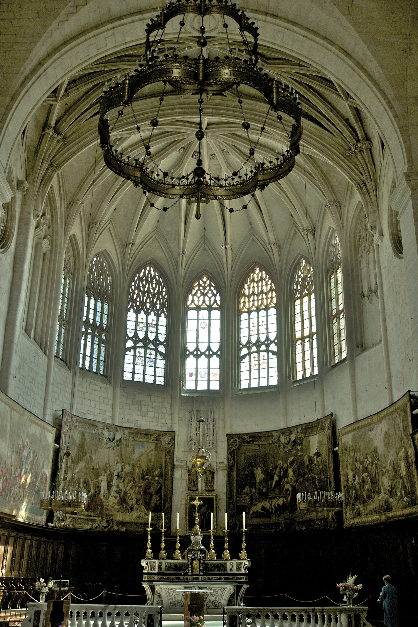 Cathédrale Saint-Vincent in Viviers; Blick von Süden